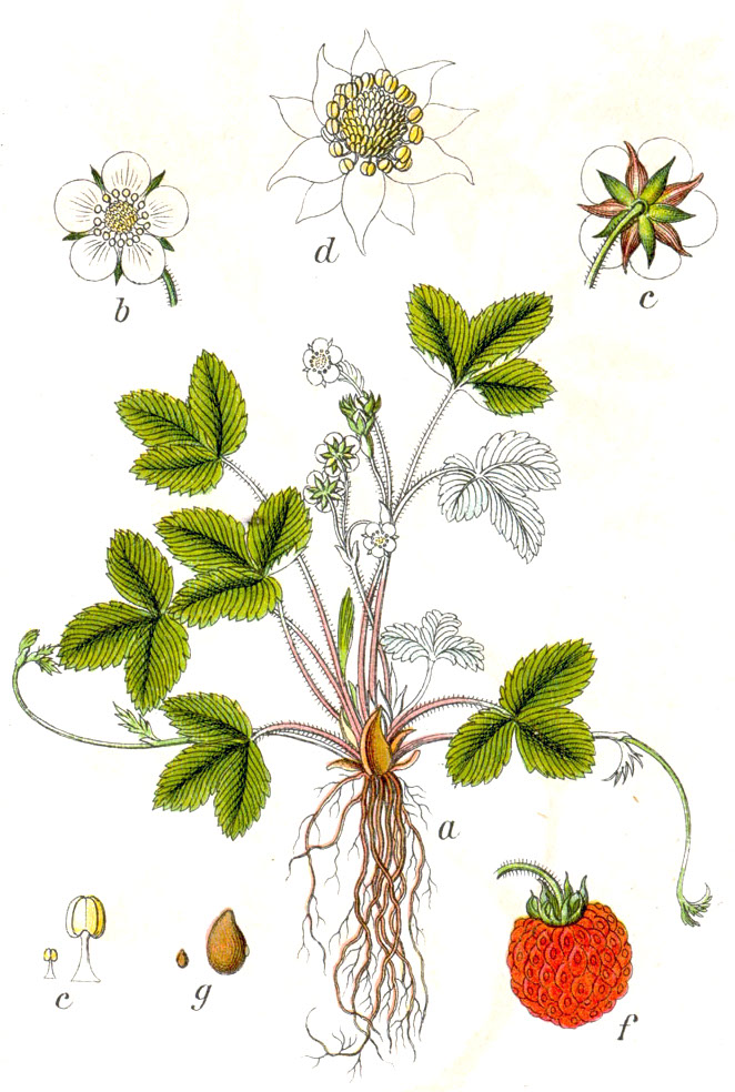 Fragaria vesca L., syn. Potentilla vesca (L.) Scop. Original Caption Wald-Erdbeere, Potentilla vesca